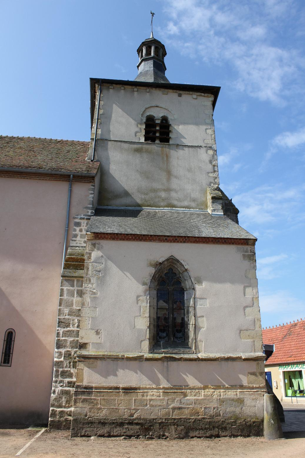 Le Veurdre (03) église St Hippolyte